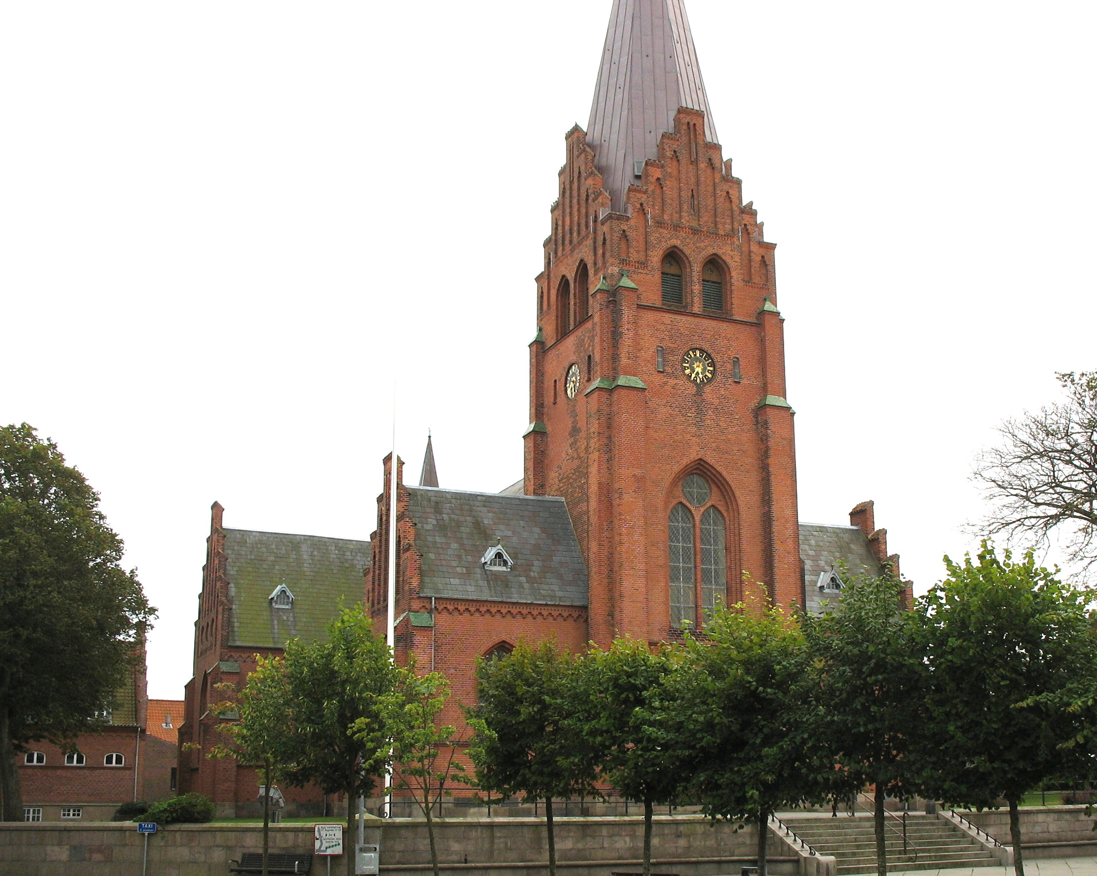 Nykøbing Mors Kirke.